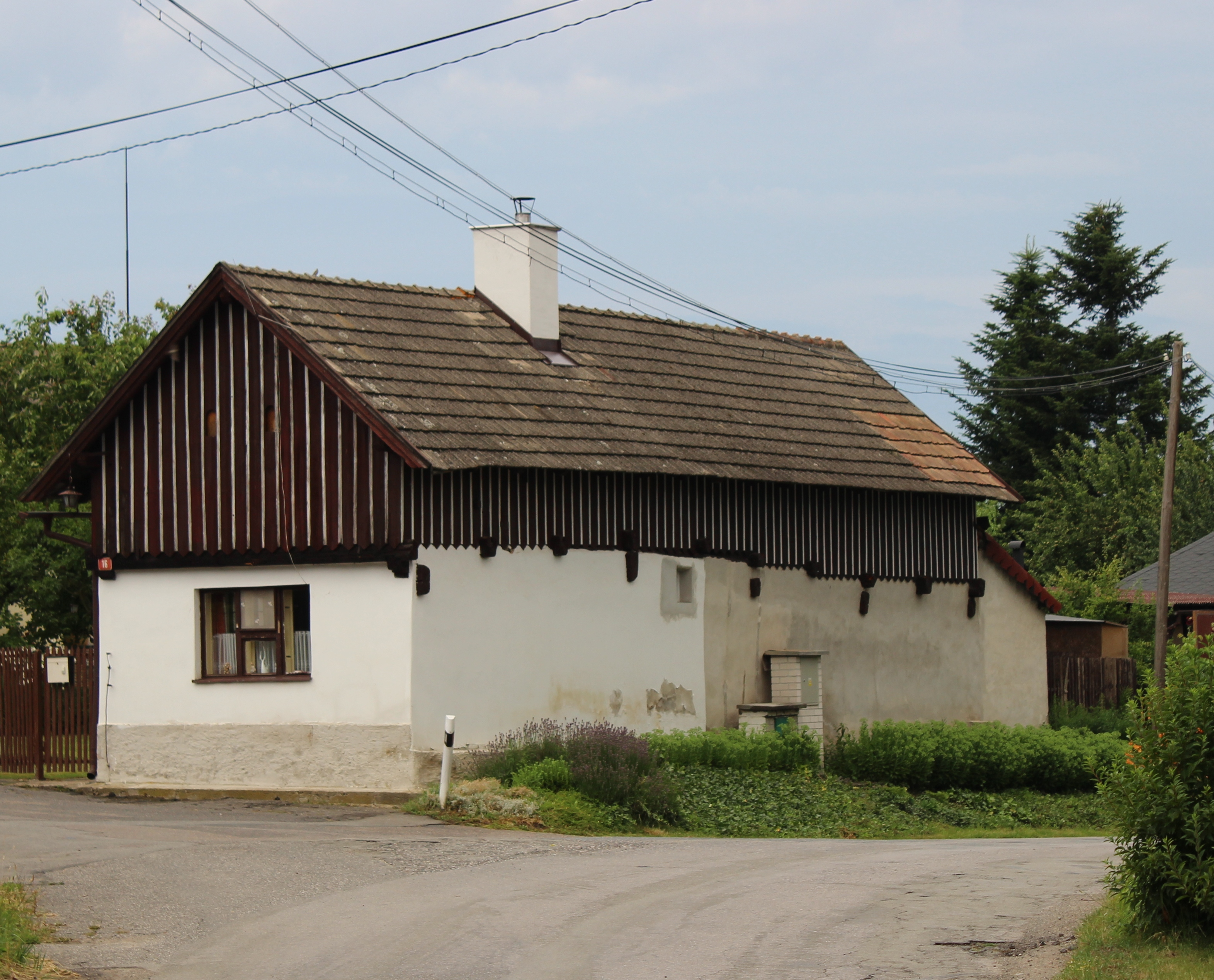 Dům číslo popisné 16 ve Strašnově, okrese Mladá Boleslav.